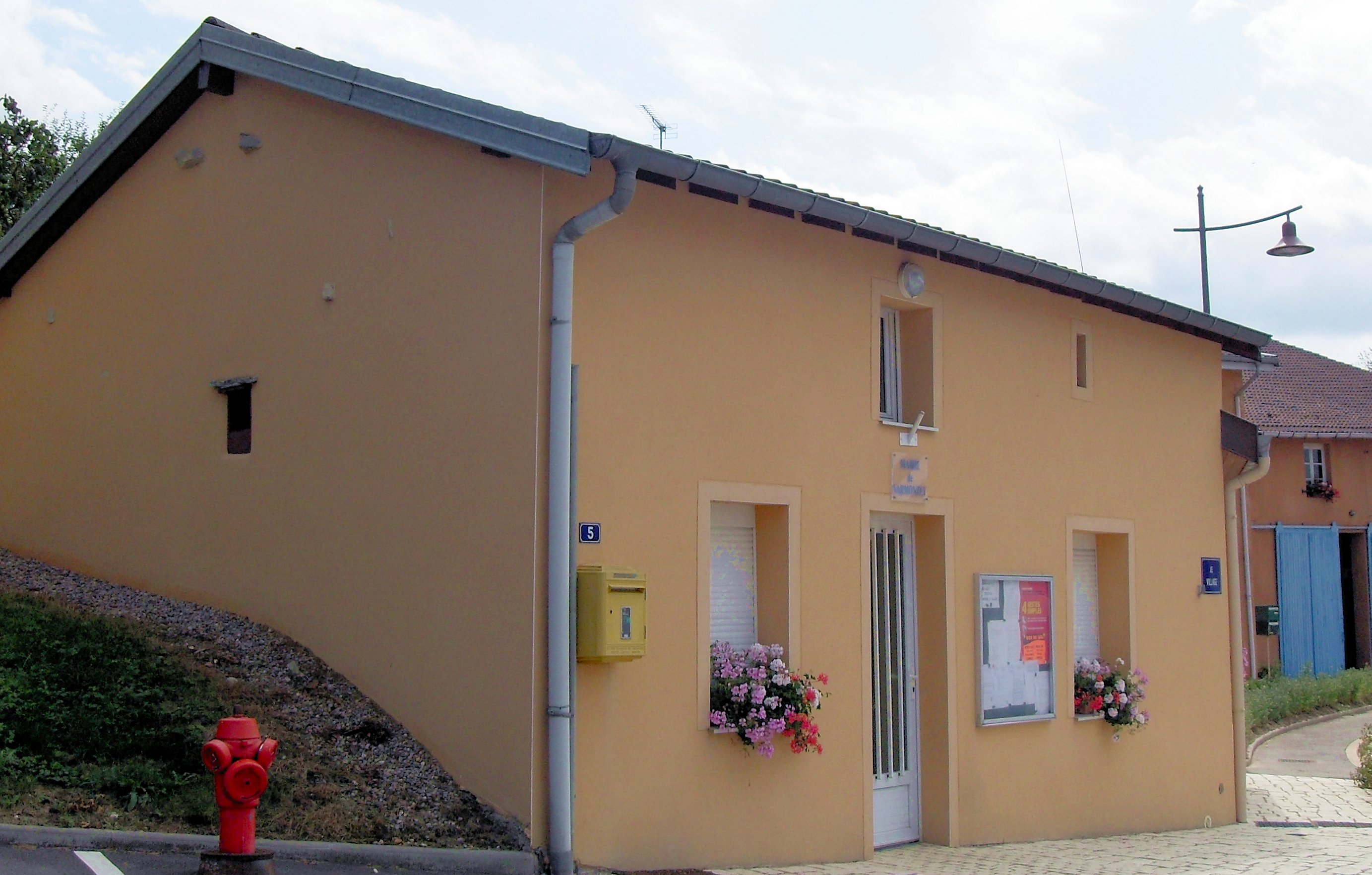 La mairie de Varmonzey